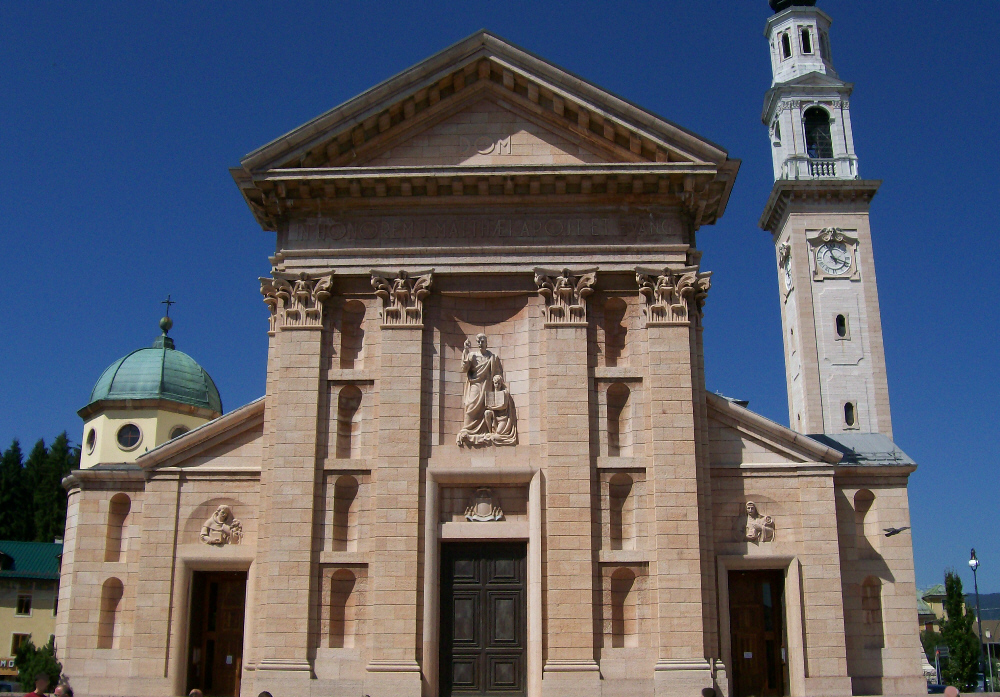 Chiesa parrocchiale di San Matteo evangelista in Asiago